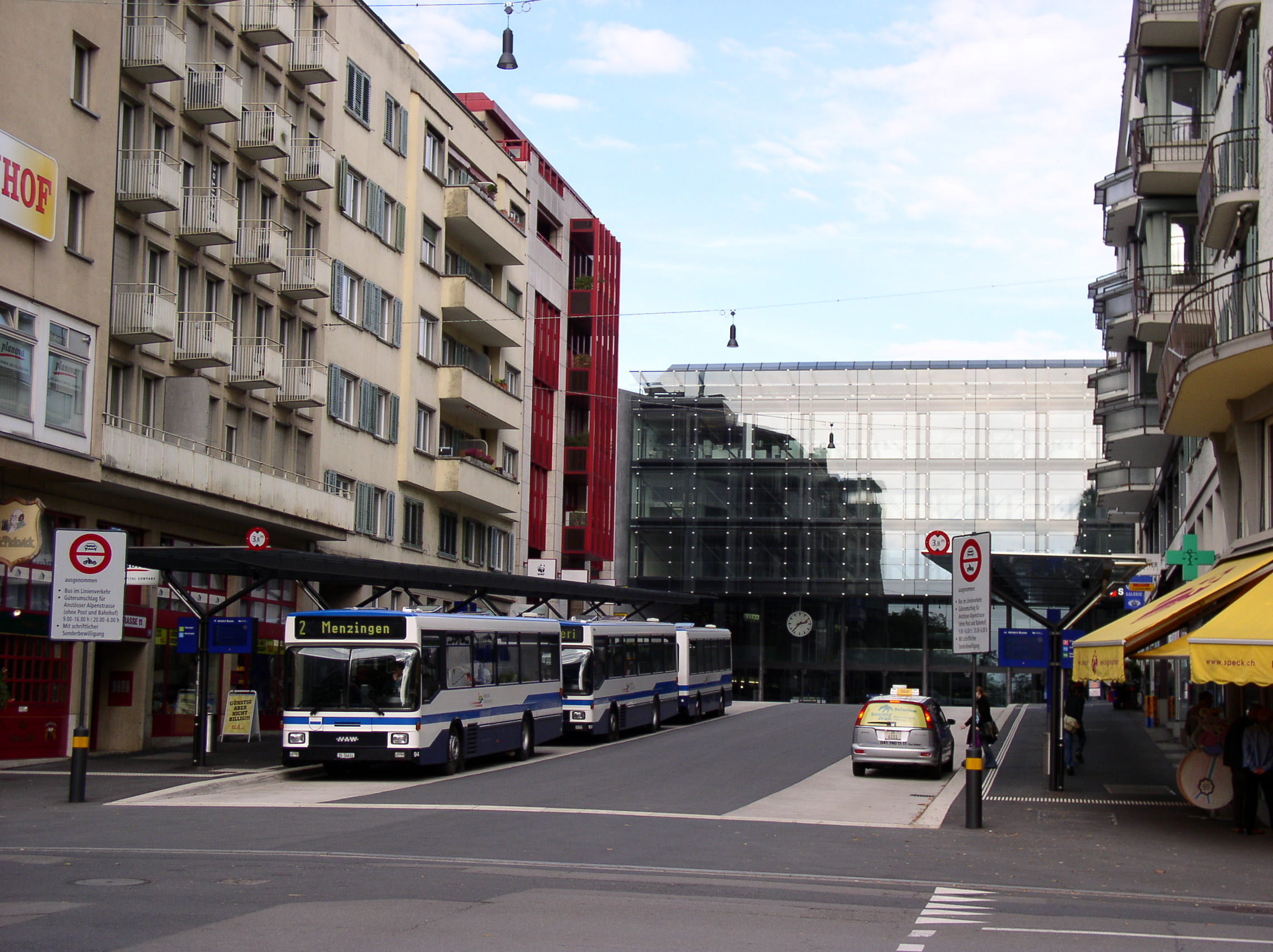 Description: Bahnhofplatz Zug: Knotenpunkt im Liniennetz der Zugerland Verkehrsbetriebe Source: photo taken by me, October 2004 Photographer: Baikonur Photographer: Baikonut